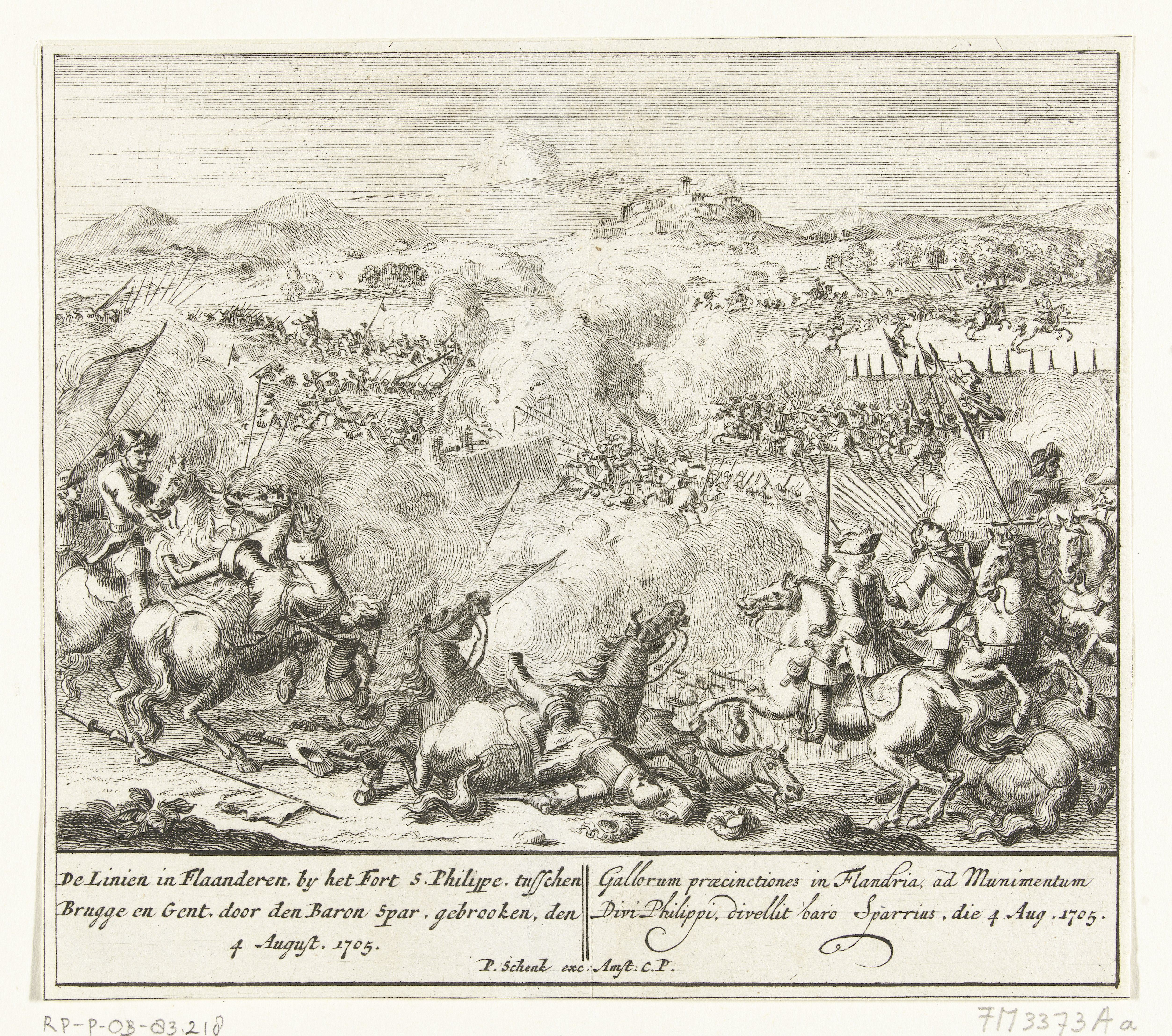 IdentificatieTitel(s): Doorbreken van de Franse Linies in Vlaanderen, 1705De Linien in Flaanderen, by het Fort S. Philippe, tussschen Brugge en Gent, door den Baron Spar, gebrooken, den 4 August. 1705 (titel op object)Objecttype: prent Objectnummer: RP-P-OB-83.218Catalogusreferentie: FMH 3373-AaOpmerking: (toegevoegd nummer RPK)FMH 3031-VI/5Hollstein Dutch 33Omschrijving: Het doorbreken door de Geallieerden onder baron Sparre van de Franse Linies in Vlaanderen bij Fort Sint-Filips (Fort Saint-Philippe), 4 augustus 1705. Ook uitgegeven als een van de negen voorstellingen op een groot blad met gebeurtenissen uit het jaar 1705 van de Spaanse Successieoorlog.VervaardigingVervaardiger: prentmaker: Pieter Schenk (I)uitgever: Pieter Schenk (I) (vermeld op object)verlener van privilege: Staten van Holland en West-Friesland (vermeld op object)Plaats vervaardiging: prentmaker: Noordelijke Nederlandenuitgever: AmsterdamDatering: 1705Fysieke kenmerken: ets en gravureMateriaal: papier Techniek: etsen / graveren (drukprocedé)Afmetingen: blad: h 156 mm × b 177 mmToelichtingDit nummer is een door het RPK toegevoegd nummer en staat niet in Frederik Muller, het werk Waar: de prent voor is gemaakt of uit afkomstig is, staat wel vermeld in Frederik Muller.OnderwerpWat: battle (+ land forces)Doorbreken van de Franse linies in Vlaanderen (1705)Wanneer: 1705-08-04 - 1705-08-04WaarVlaanderenFort Sint-FilipsWie: Karel Willem baron van SparreVerwerving en rechtenVerwerving: onbekendCopyright: Publiek domein